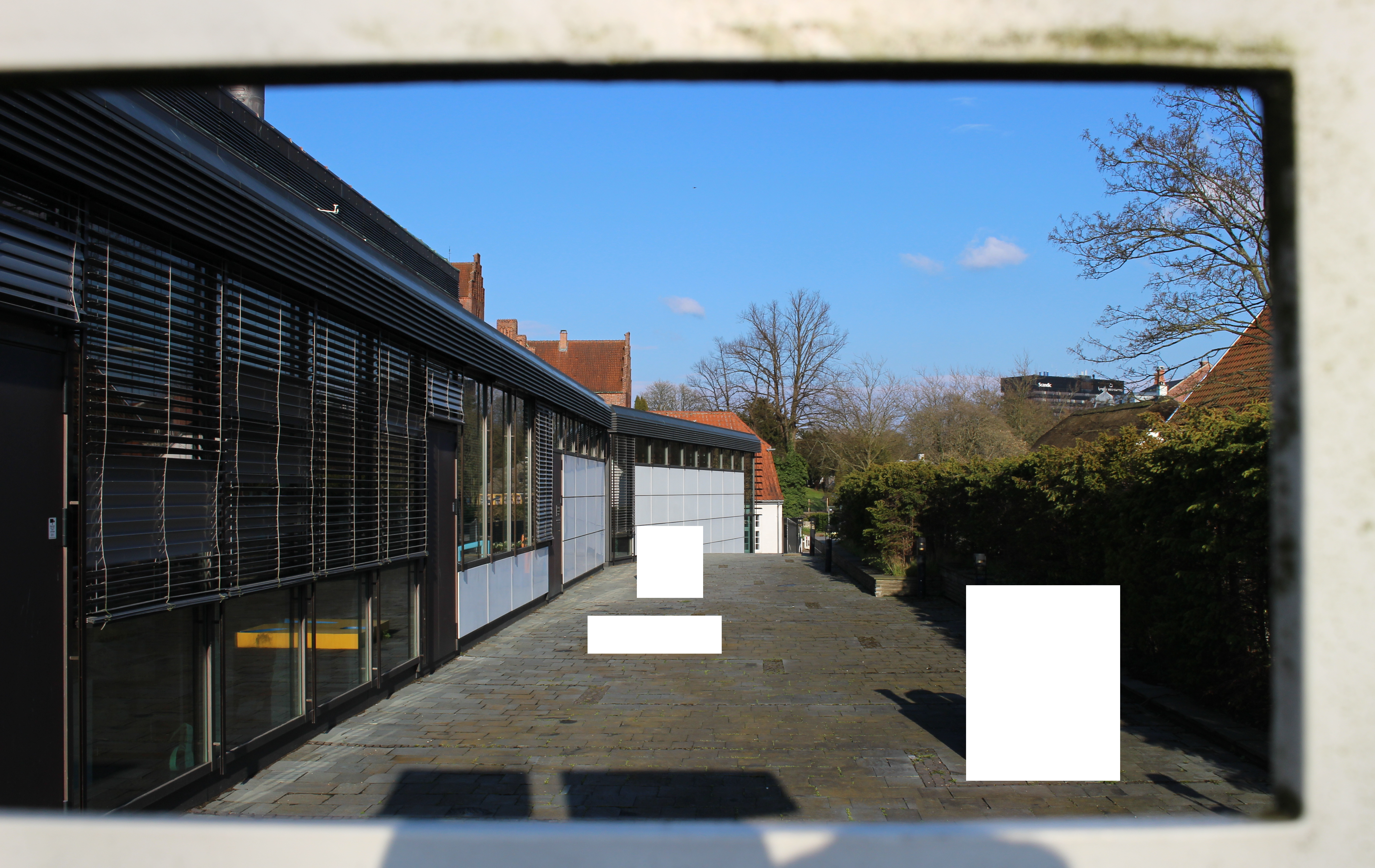 Willy Ørskovs skulpturgruppe i fire dele ved Stadsbiblioteket i Lyngby. Censureret på grund af ophavsret.